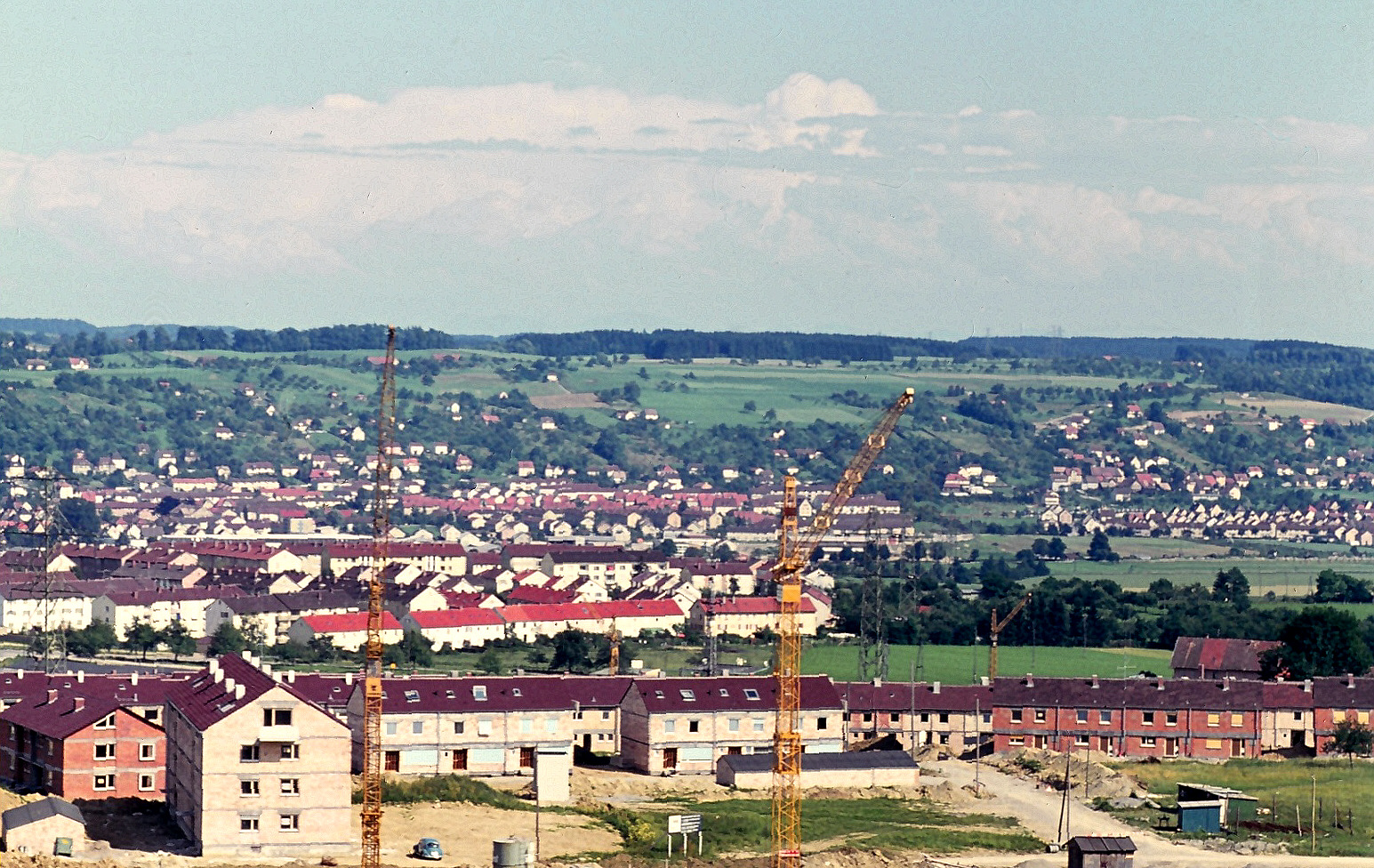 Ravensburg, Germany: Weststadt (Mittelösch)